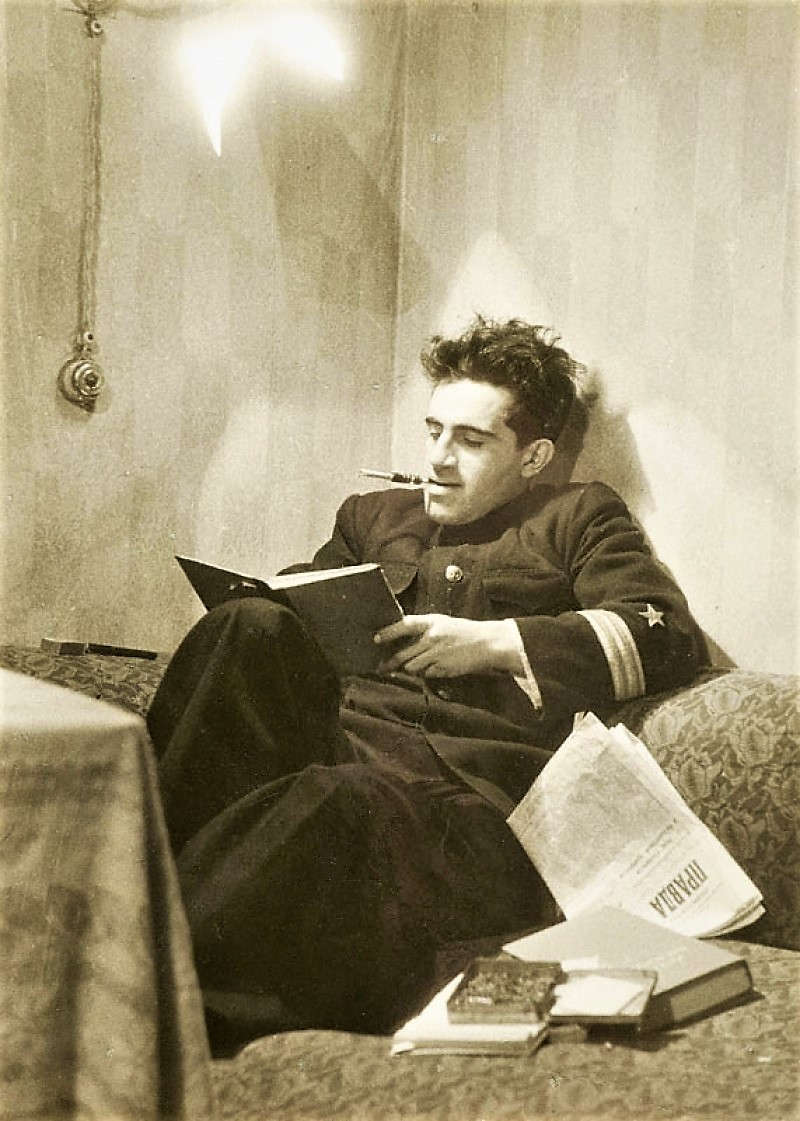 Редактор многотиражной газеты соединения подводных лодок Балтийского флота "Дозор" и драматург Александр Крейн (псевдоним Крон) в форме политрука военно-морского флота (сепия)